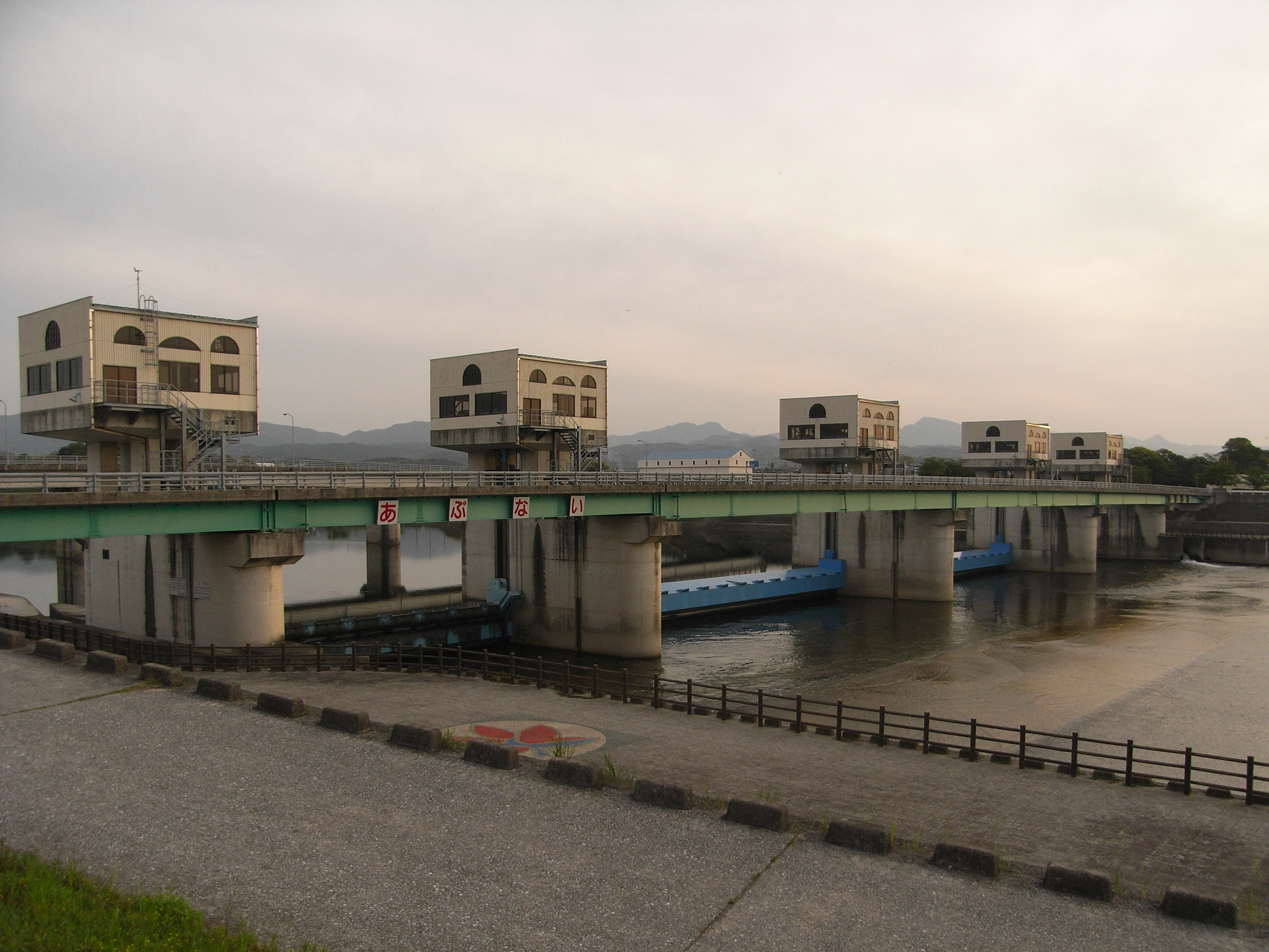 Dam